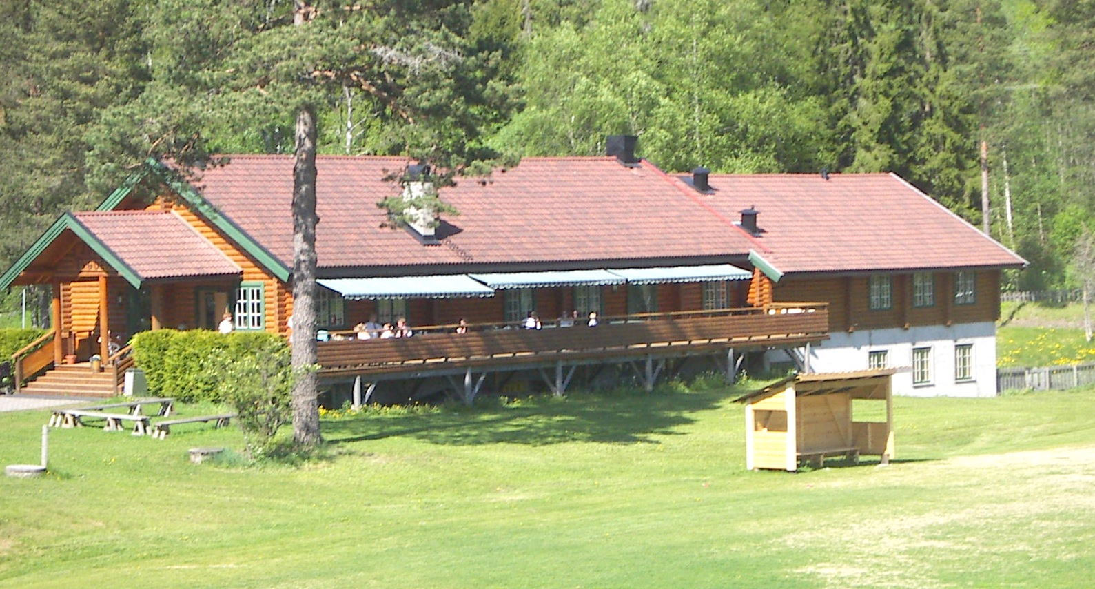 Bilde av bygdehuset på Åbogen i Eidskog Kommune